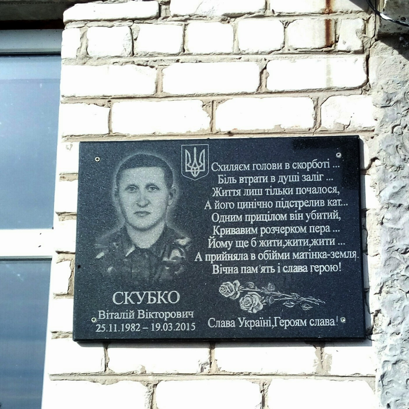 Скубко Віталій. Меморіальна дошка на стіні сільської школи